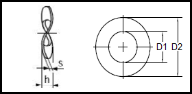 DIN 137